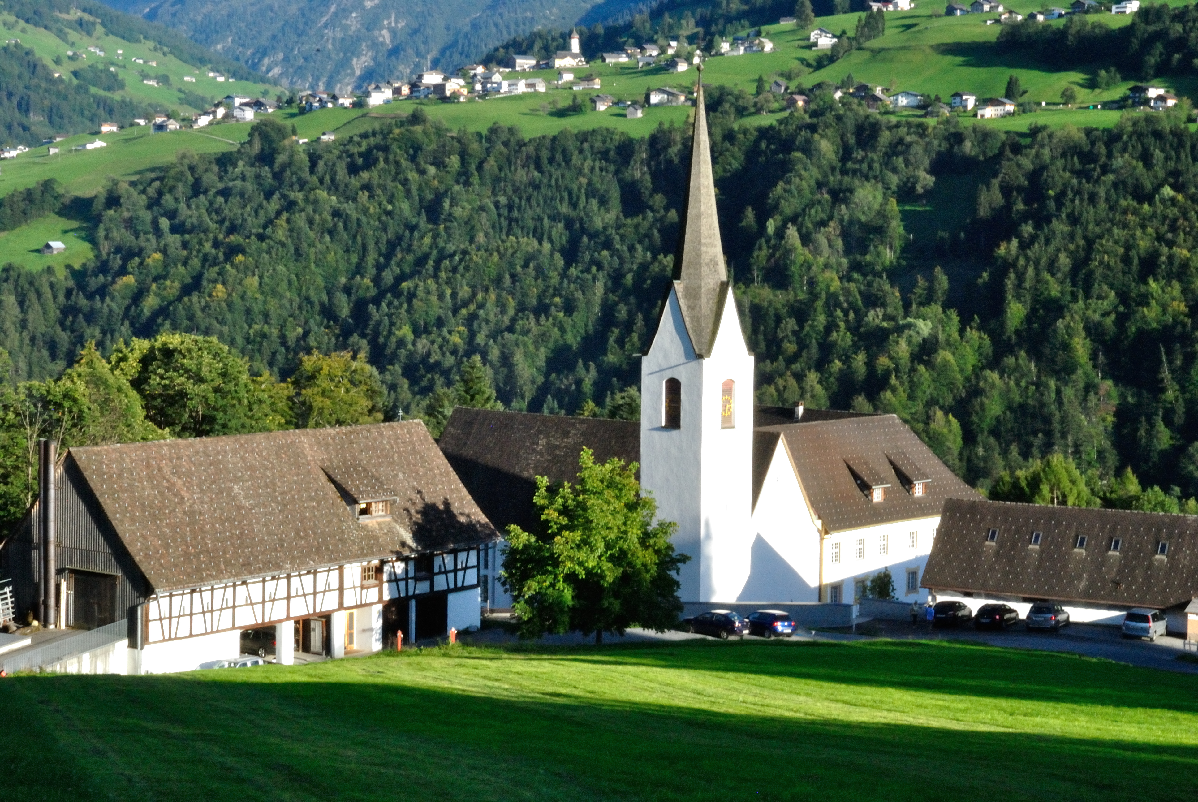 Propstei St. Gerold. Gesamtanlage der Propstei vom Gemeindeamt oberhalb der Anlage.